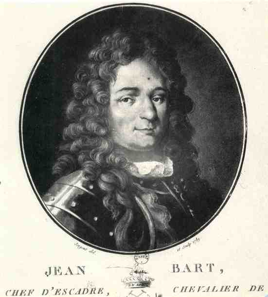 Portait de Jean Bart (1650-1702), corsaire. Gravure du XVIIIe siècle